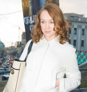 Дарья Мороз на премьере фильма “Обитаемый остров: СХВАТКА”